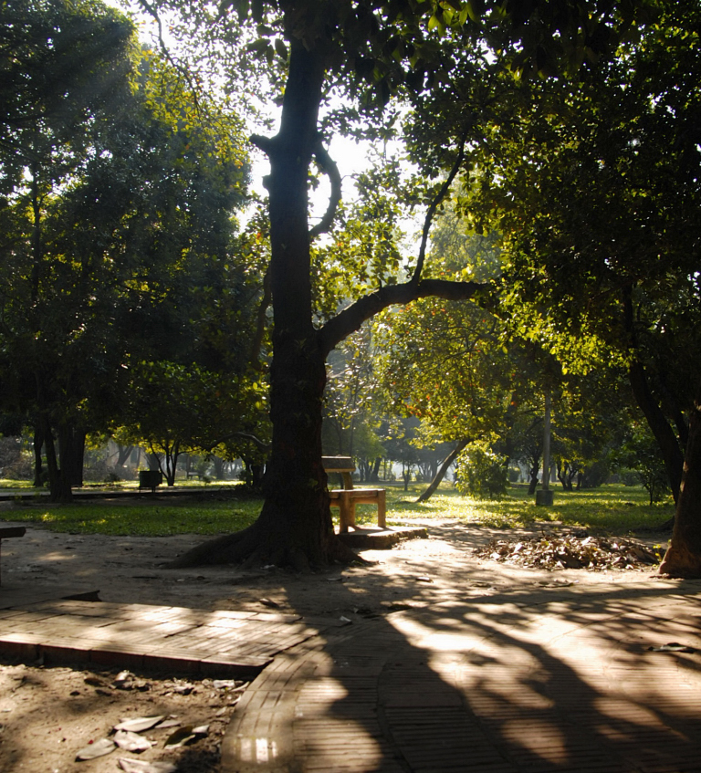 Romna park, Dhaka, Bangladesh.